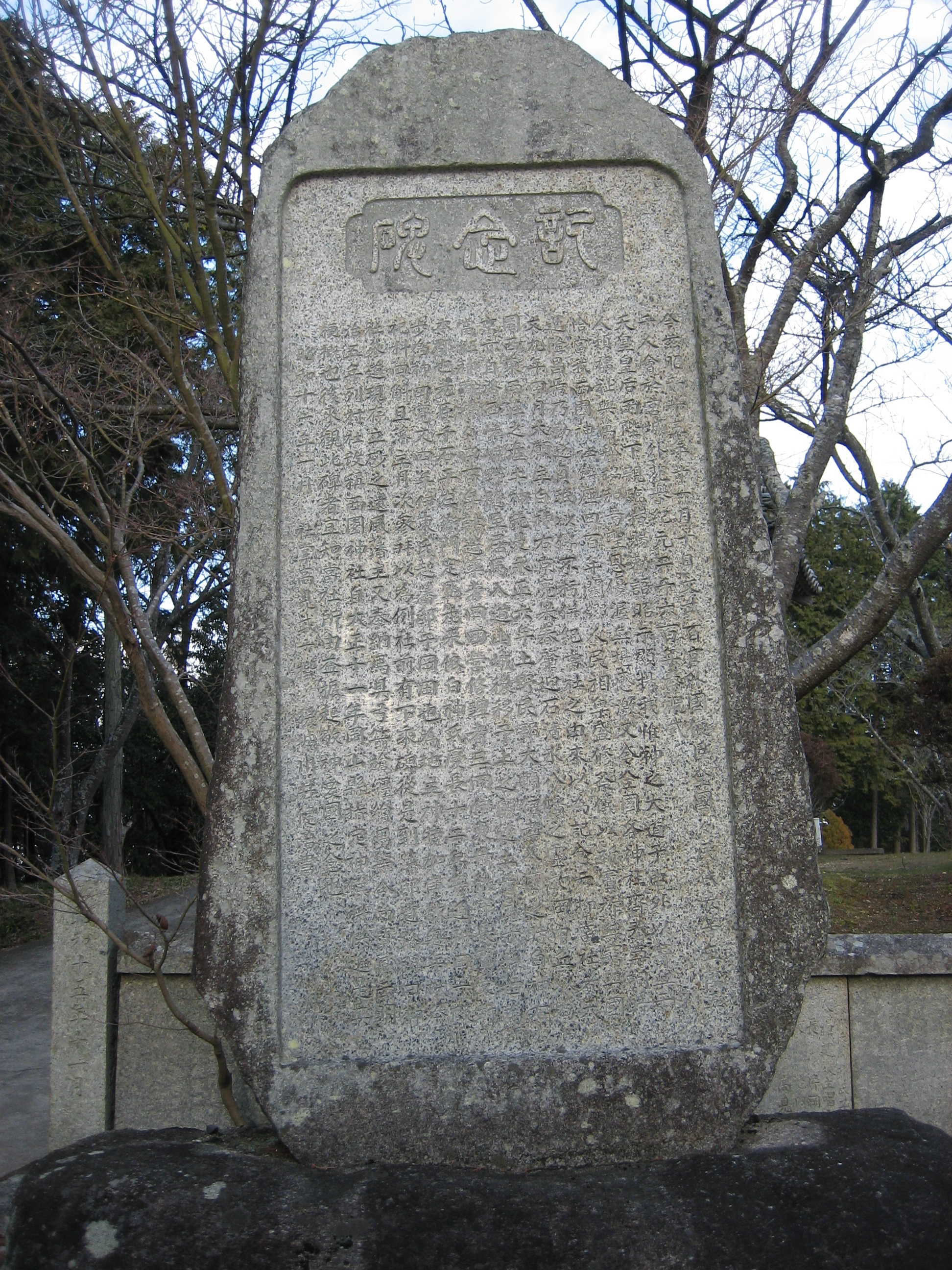 Nj-kinenhi